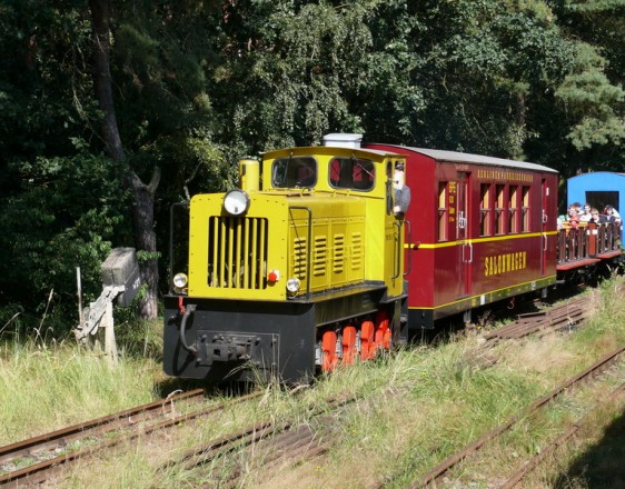 Die Parkeisenbahn beim Parkeisenbahn Fantag